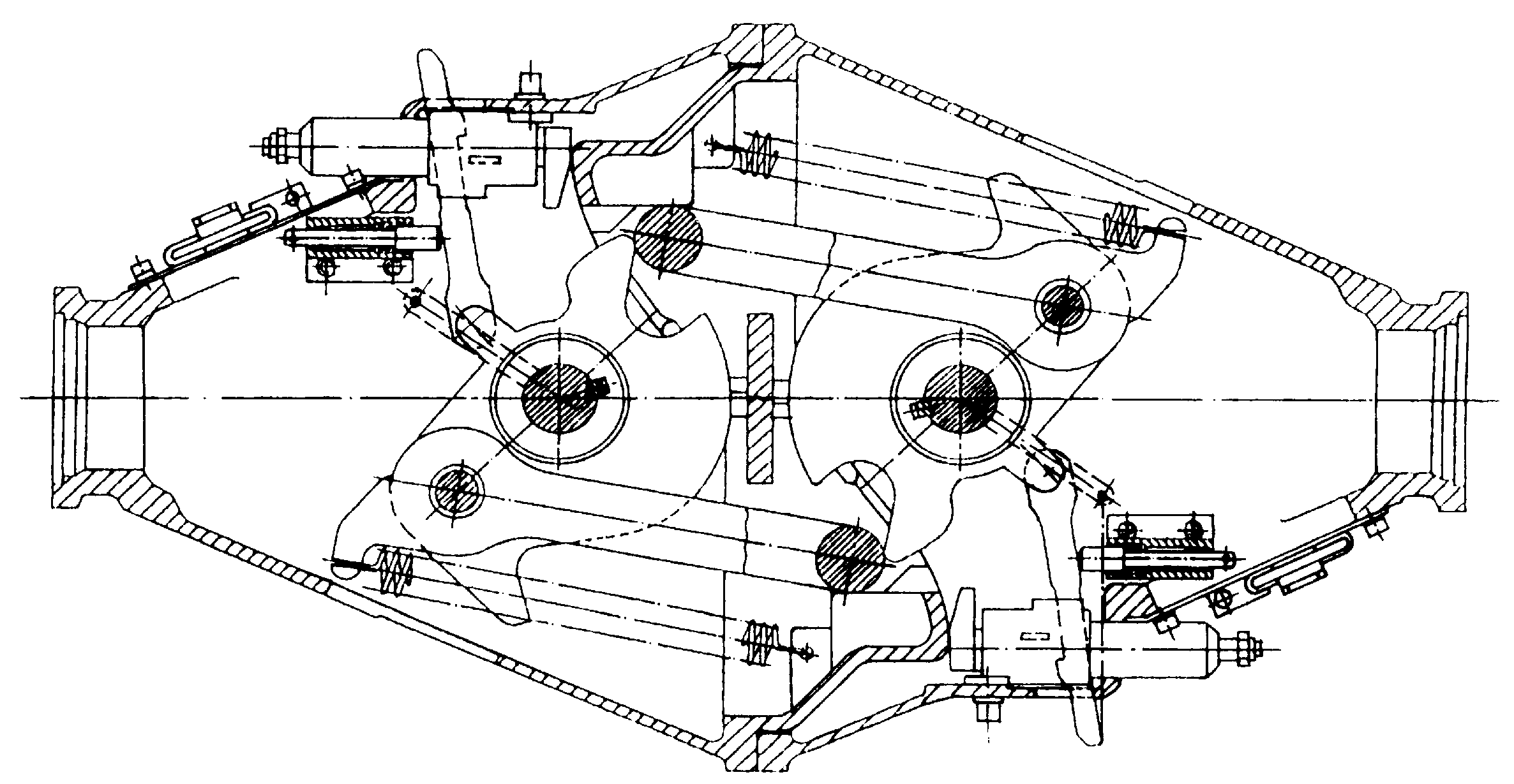 entkuppelte Stellung des Zweistellungsverschlusses einer Scharfenbergkupplung vor dem Auseinanderfahren der Waggons